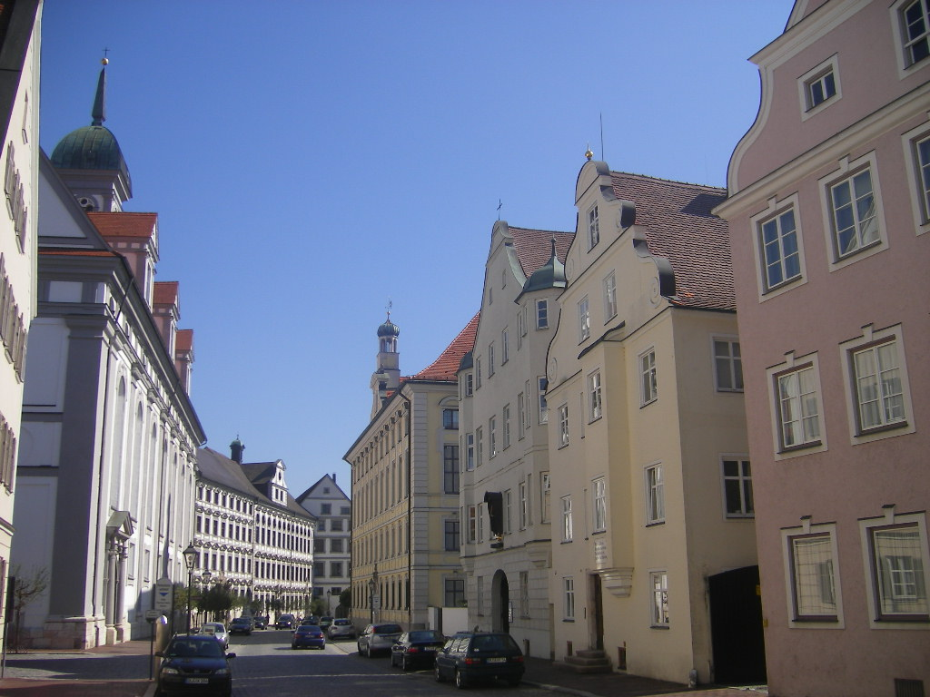 Dillingen a.d.Donau